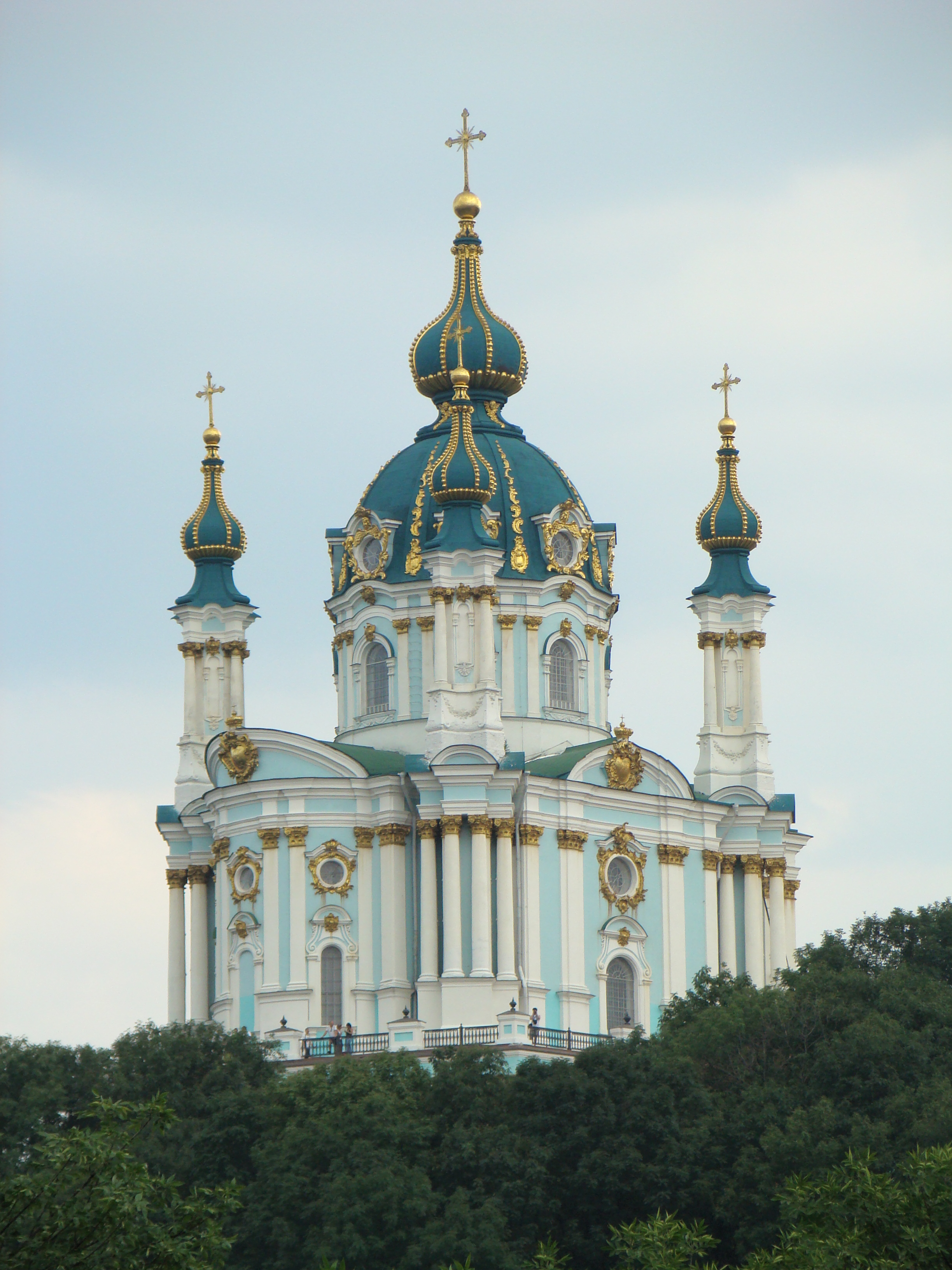 Церква Андріївська, Київ, Андріївський узвіз, 23